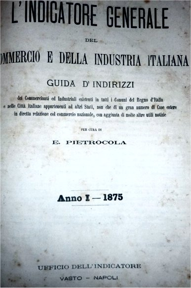 frontespizio de "L'indicatore generale del commercio e dell'industria italiana..." anno I 1875 (ripreso dall'originale da me acquistato)